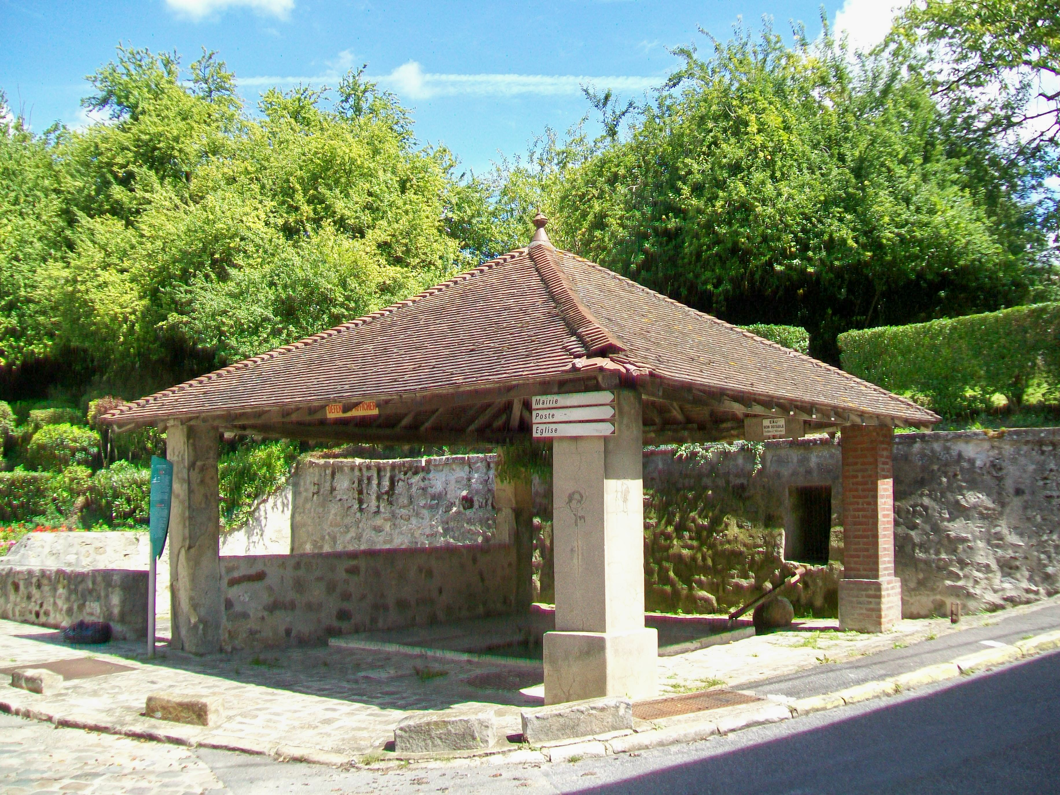 Le lavoir de Frontignon, en bas de la rue du même nom qui mène vers la place de l'église (place de Stalingrad), à l'ouest du bourg. Ce fut l'un des trois lavoirs de la commune.